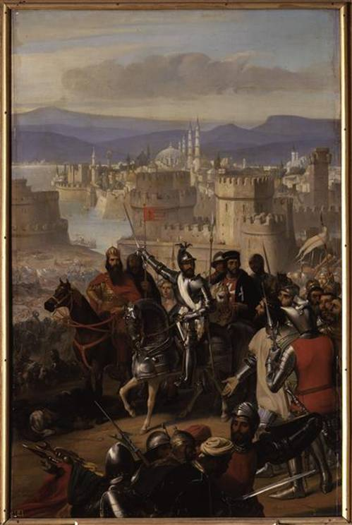 обсада на Триполи